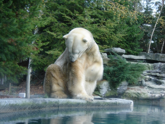 Ours Blans Zoo de La Flèche